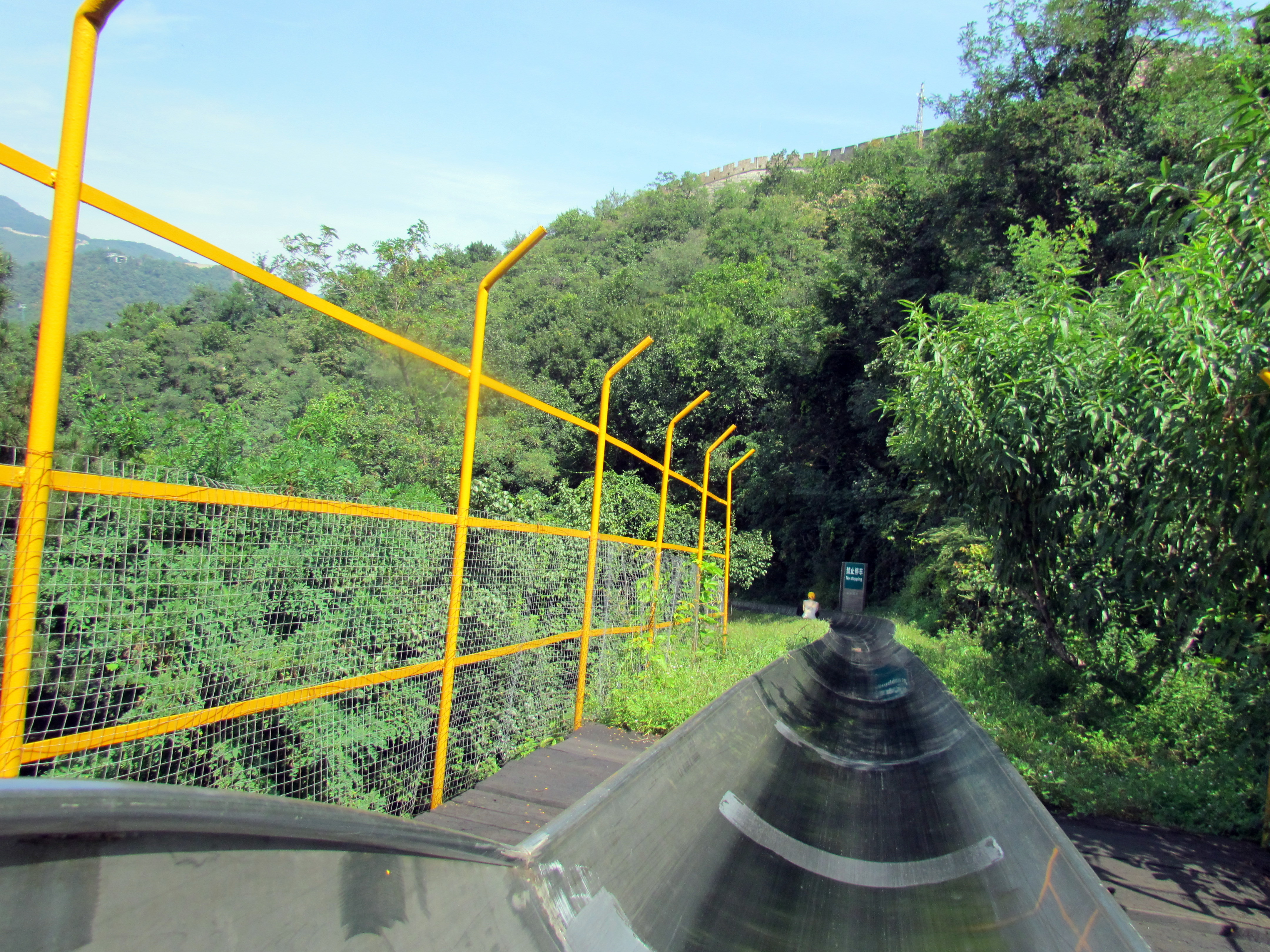 Beijing, China - September 2011 (cc) David Berkowitz - /